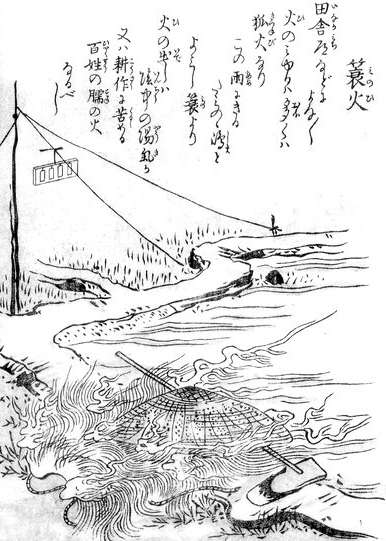 Minobi (蓑火) from the Konjaku Hyakki Shūi (今昔百鬼拾遺)